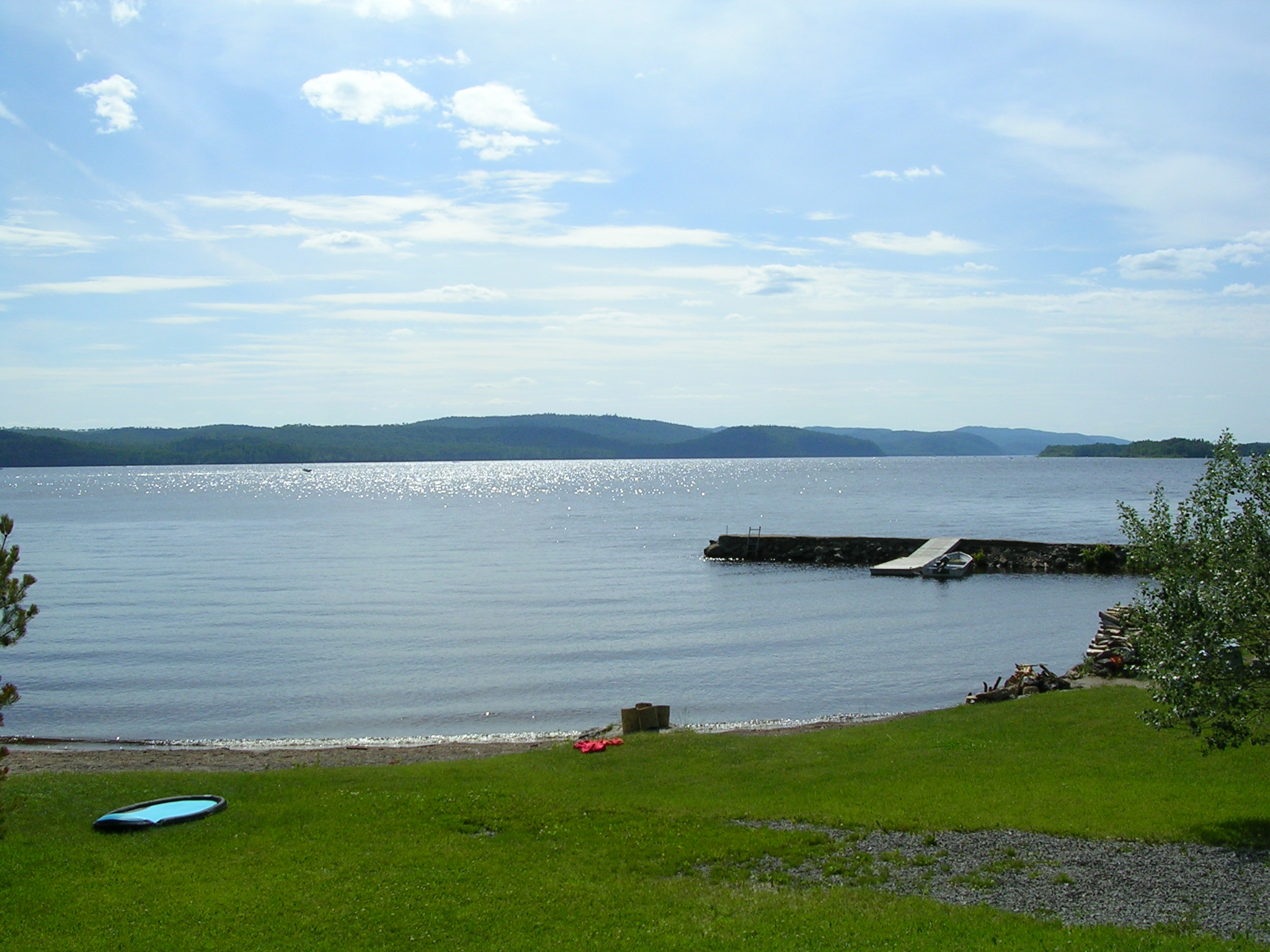 Lac Kénogami